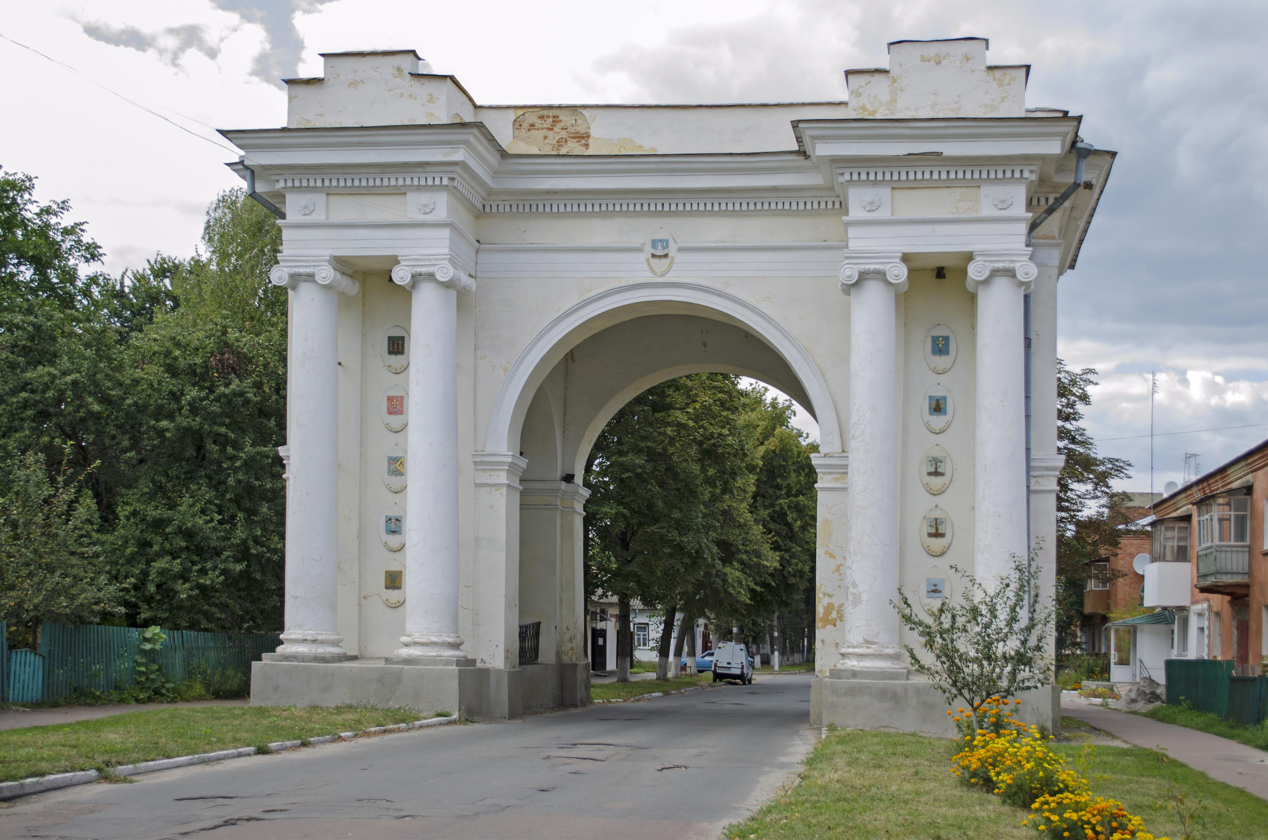 Трiумфальна брама мур.), Новгород-Сіверський, вул.К.Маркса, 34